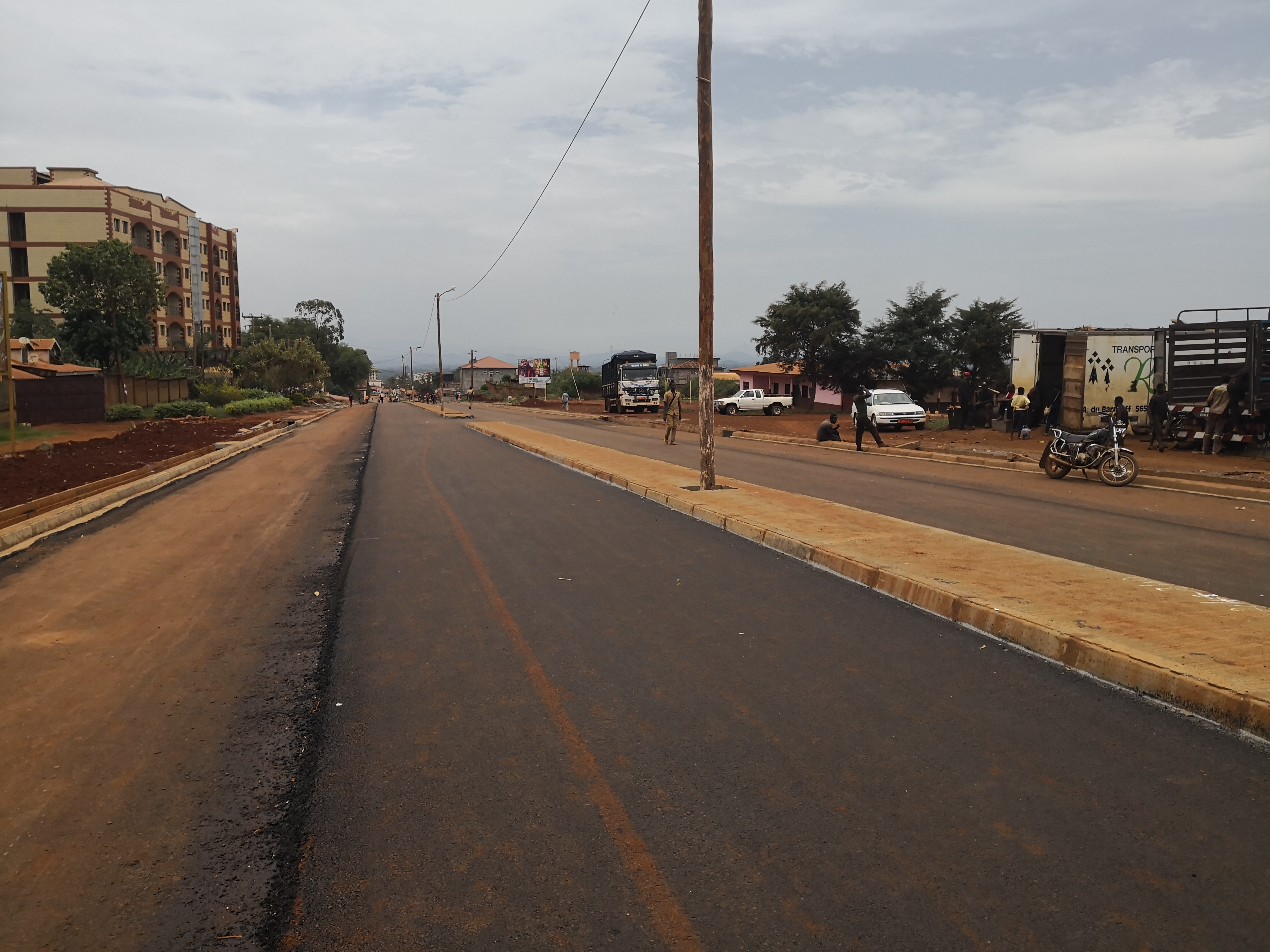 Bitumage de l'axe place des fêtes - Chateaux d'eau.